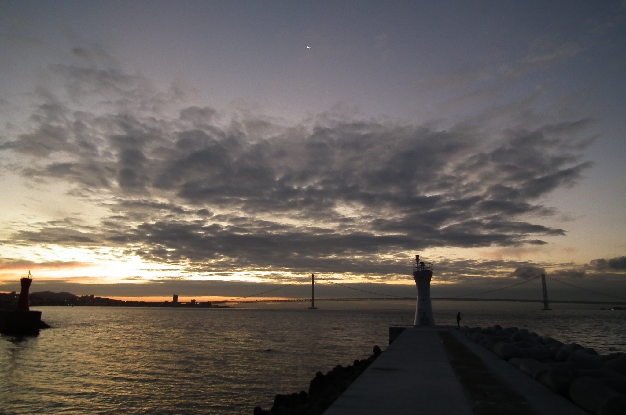 Port of Akashi,Akashi bridge 明石港 明石市岬町 明石海峡大橋 朝焼け